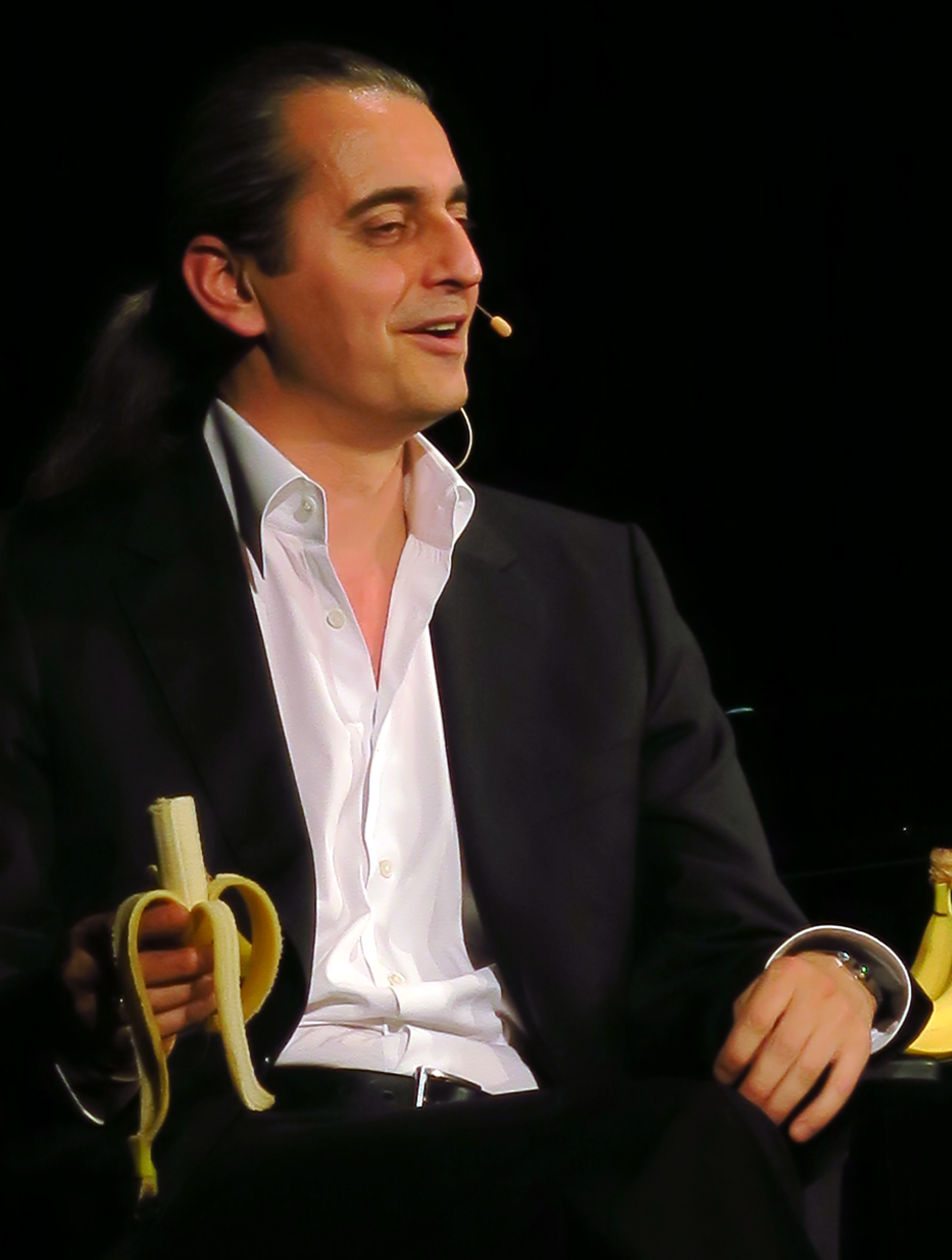 Hagen Rether, deutscher Kabaretist und Pianospieler im April 2016 mit seinem Programm "Liebe" in der Schlossberghalle in Starnberg, Oberbayern